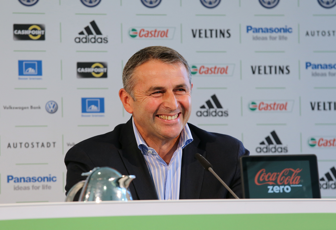 Klaus Allofs, VfL Wolfsburg bei der Pressekonferenz zur Vorstellung von Neuverpflichtung Luiz Gustavo.